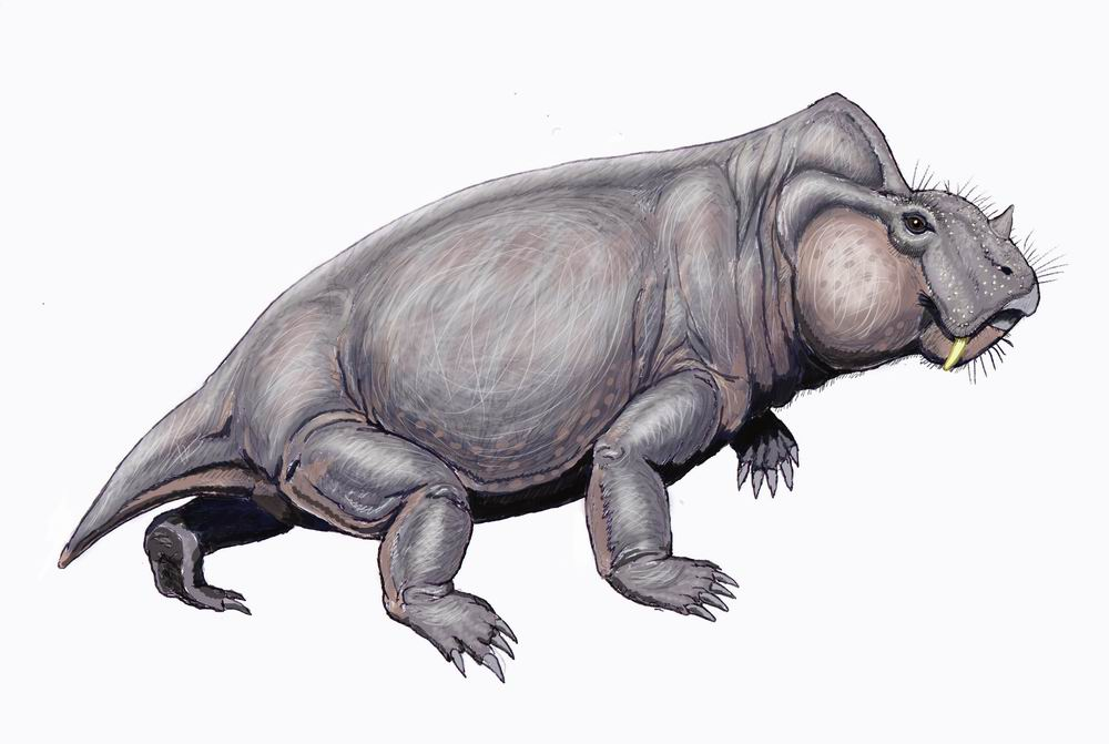 Rabidosaurus cristatus - triassic dicynodont from Russia